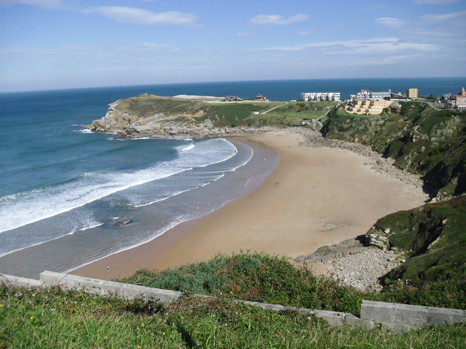 Playa de los locos